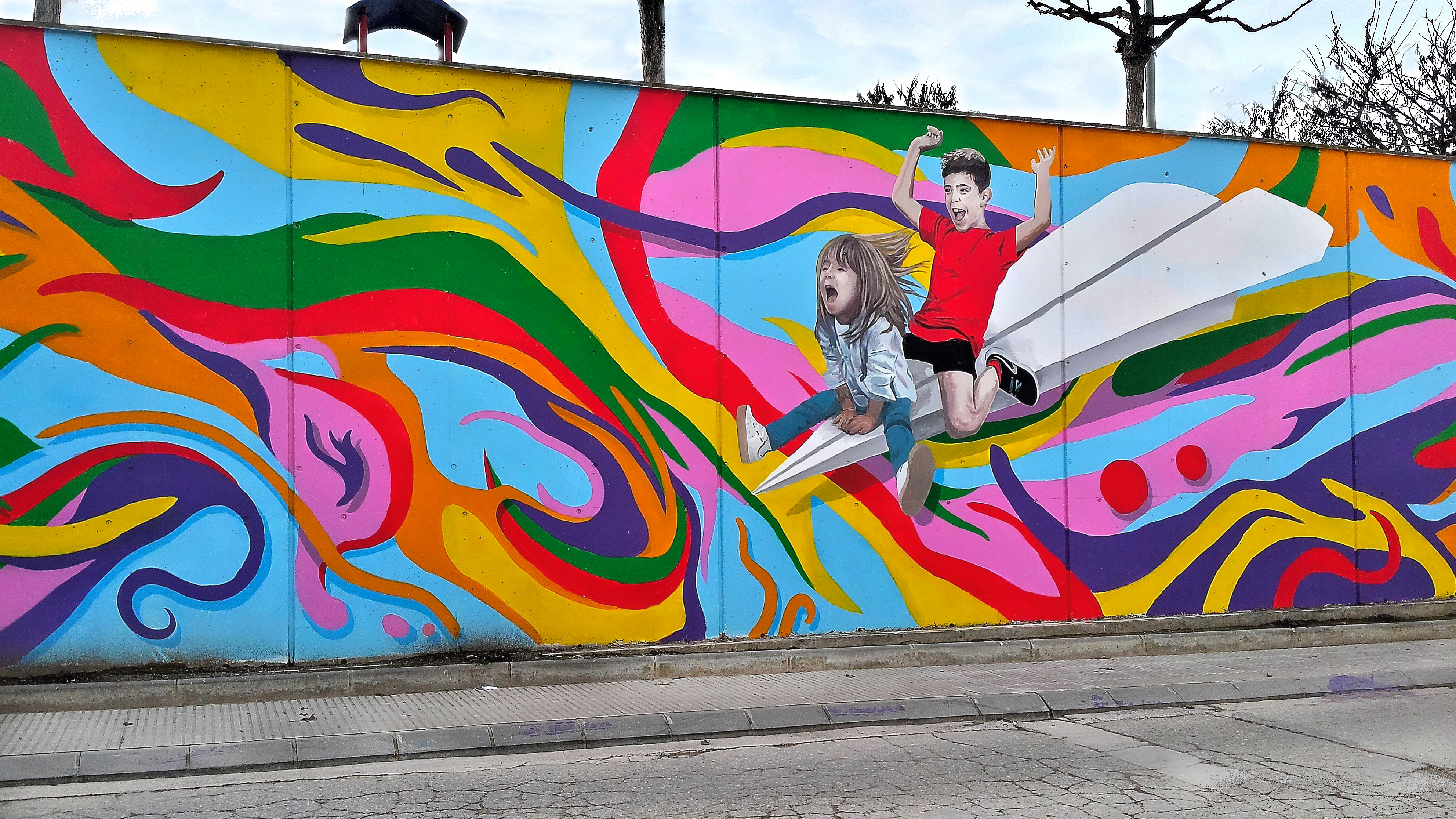 Mural de Oriol Arumi que puede verse en la calle Miralbó de Alcoletge (Lleida)